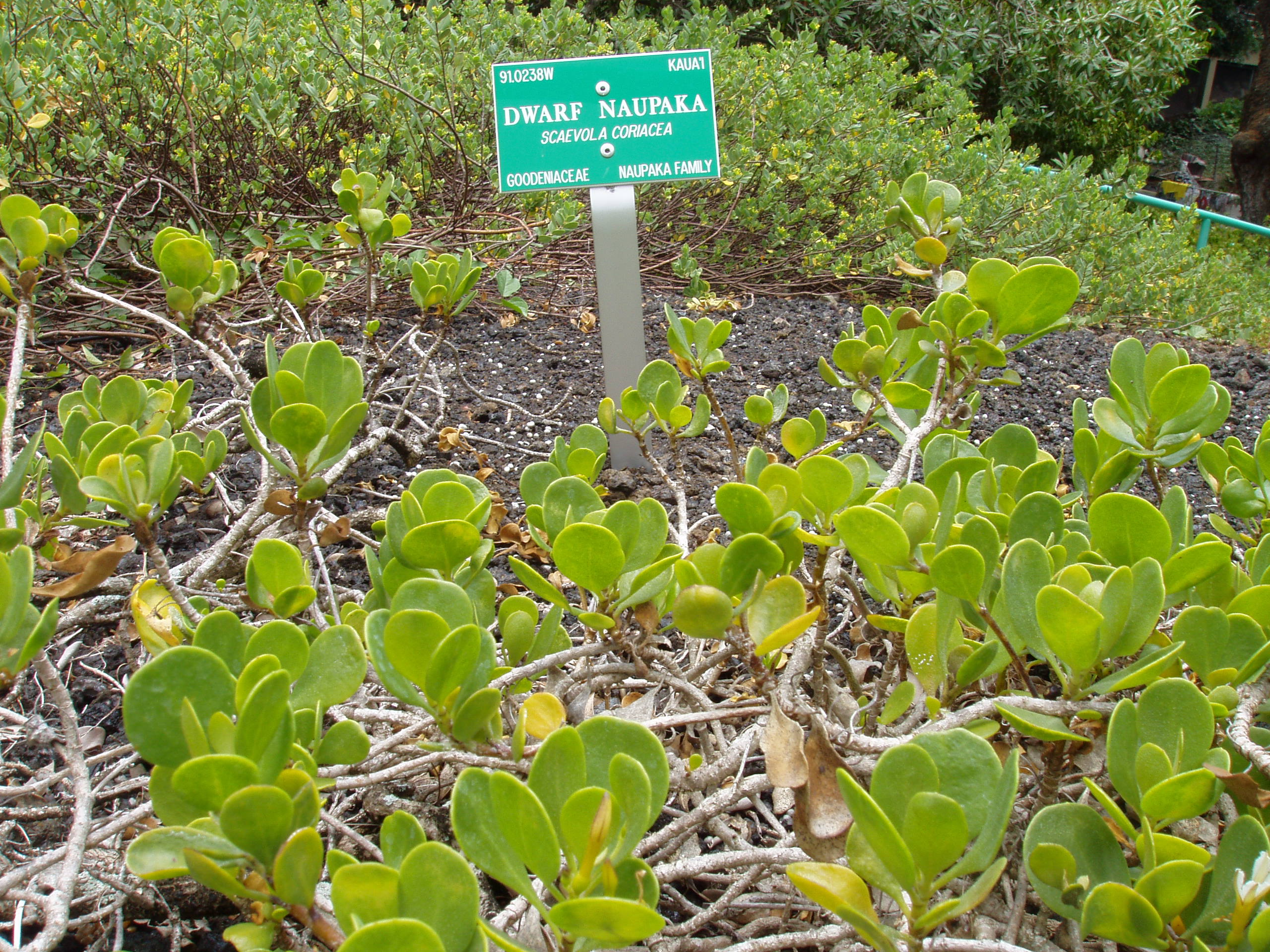 Scaevola coriacea (dwarf naupaka) - Lili'uokalani Botanical Garden, Honolulu, Hawaii, USA.